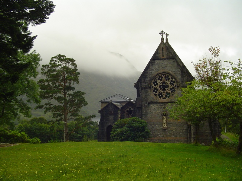 church in GlenfinnanKirche in Glenfinnan